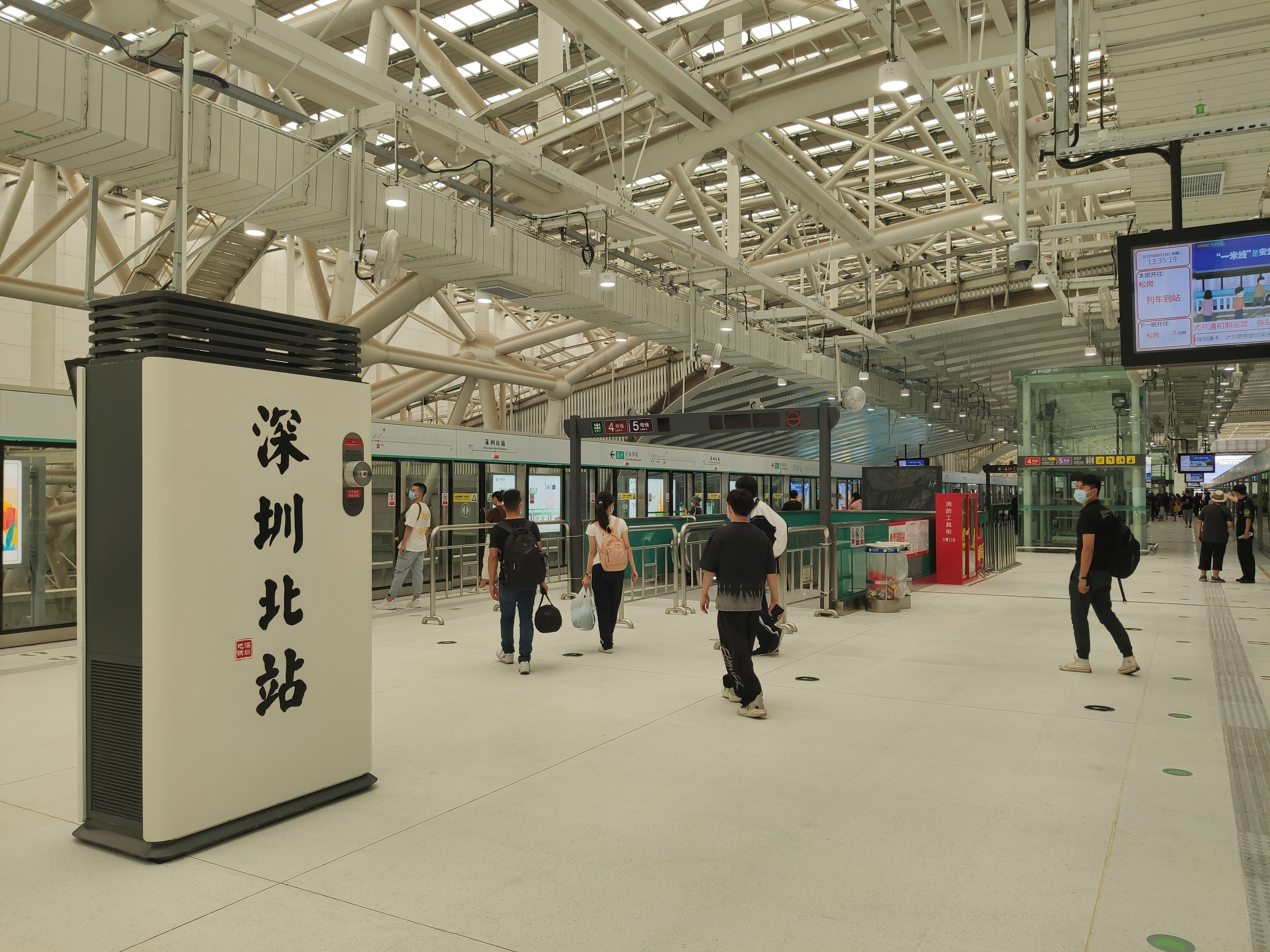 6号线深圳北站站台